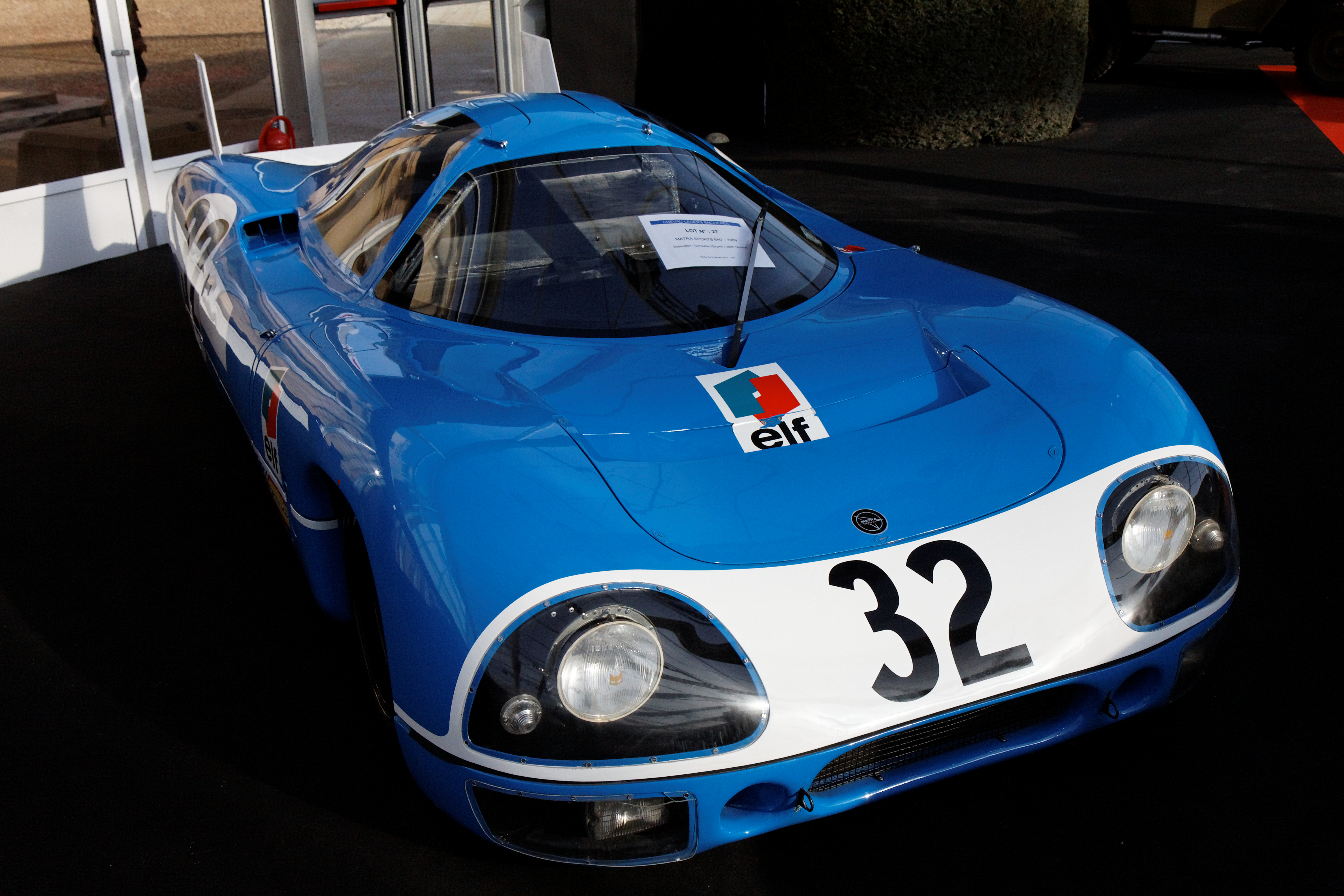 Matra MS640 - Festival Automobile International 2011 - Vente aux enchères